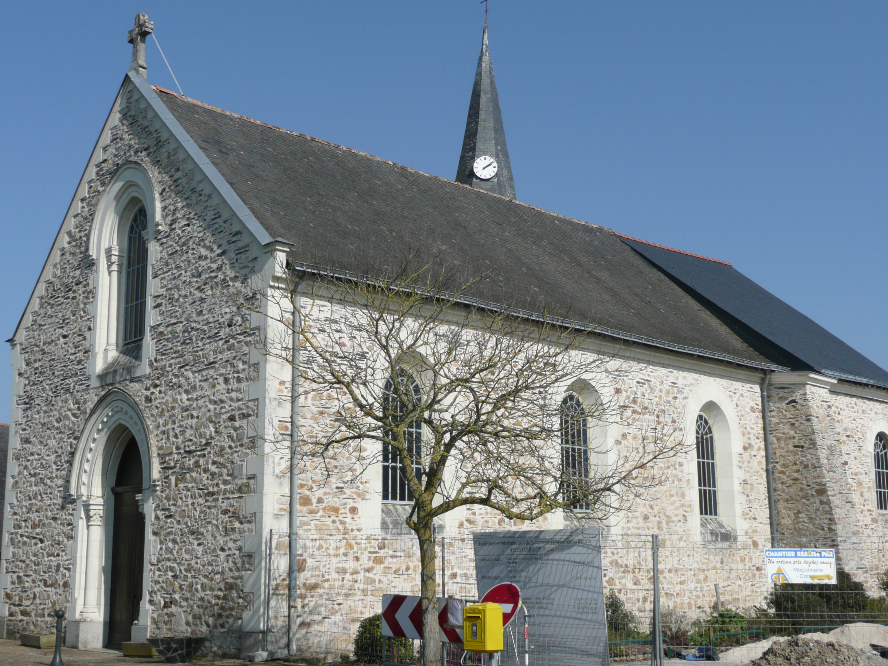 Eglise de Bourg-l'Évêque